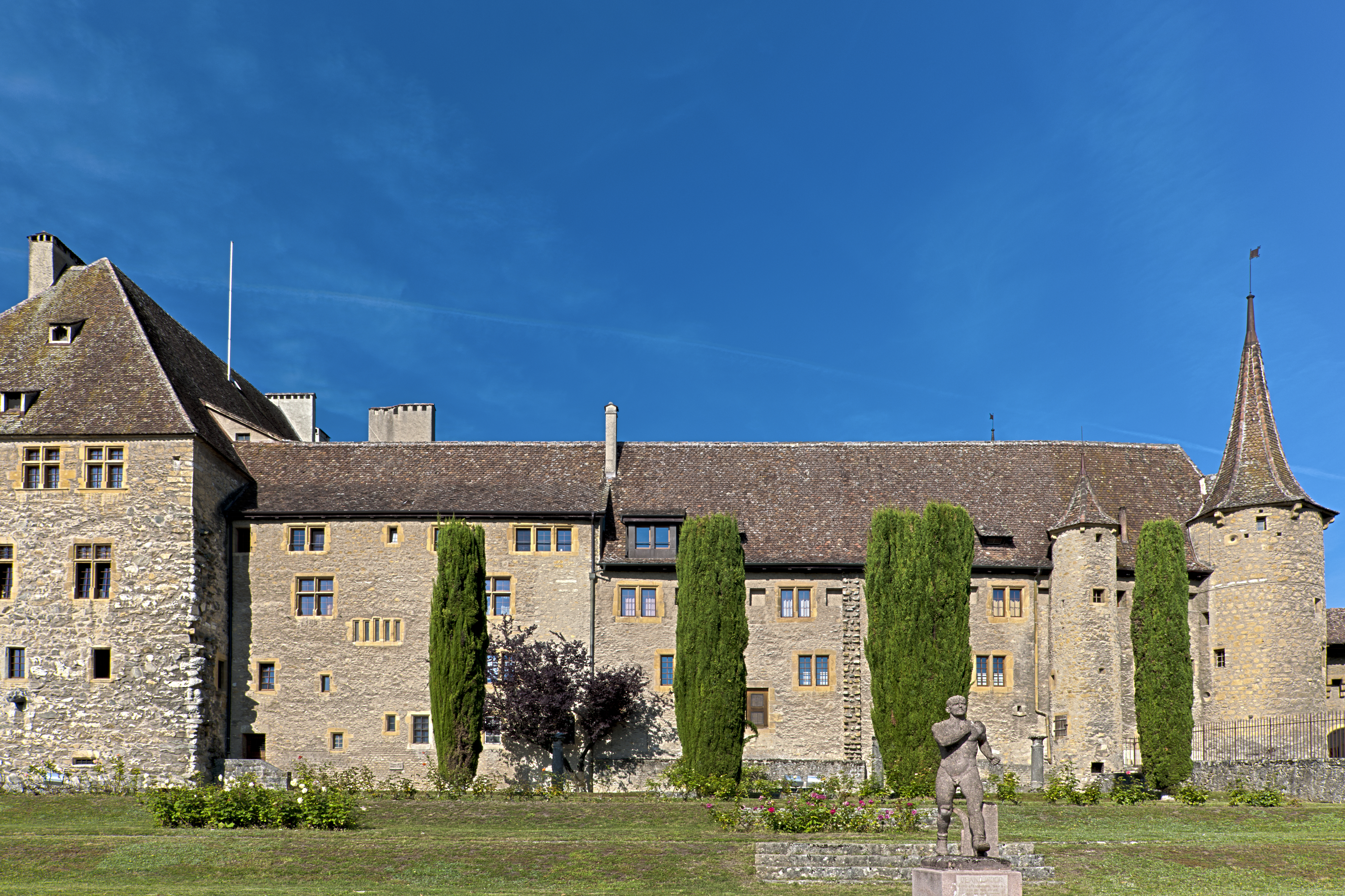 Colombier, Arsenal de Colombier